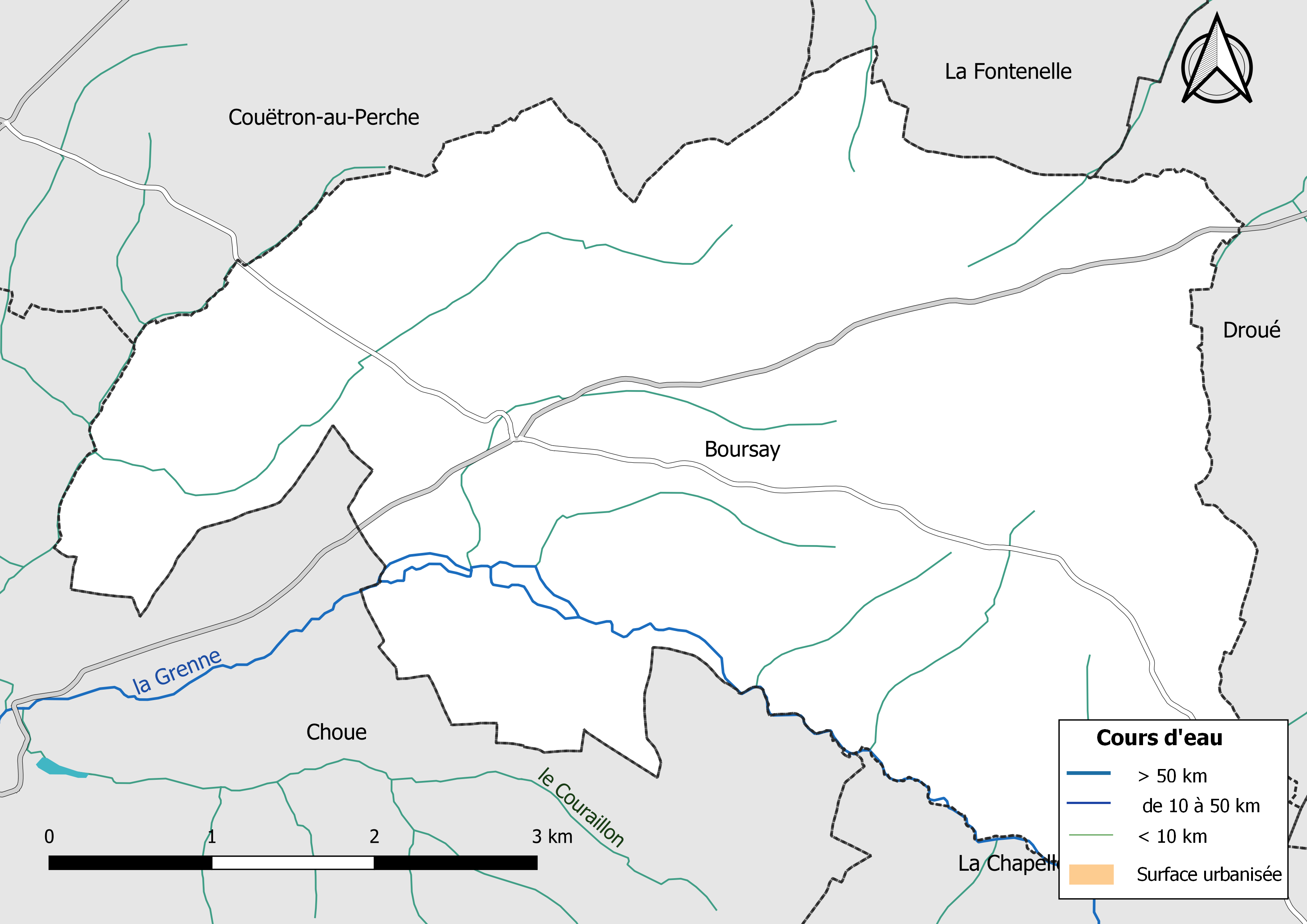 Carte du réseau hydrographique de la commune de Boursay (France).